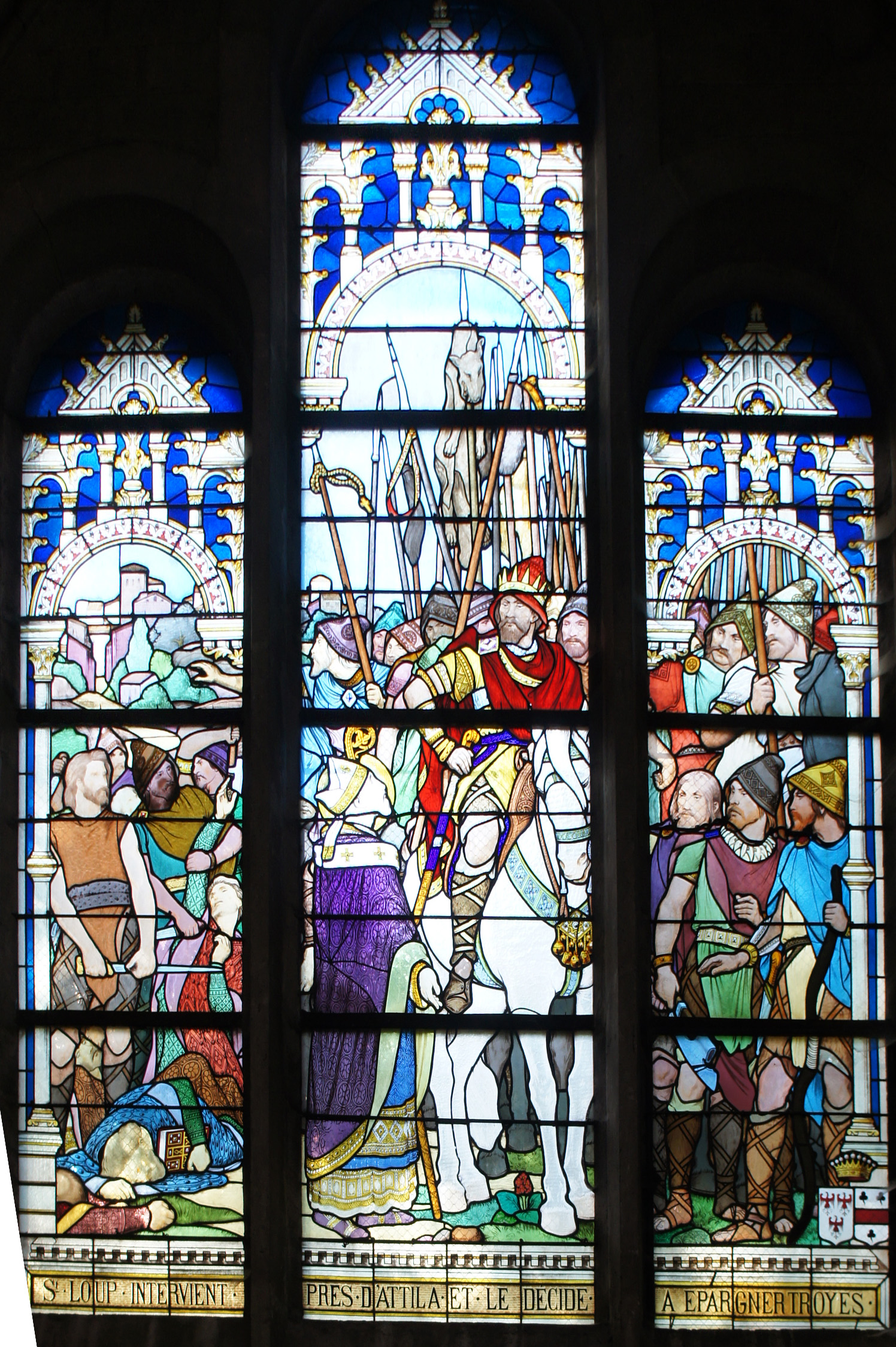 Vitraux représentant Saint Loup sauvant la ville de Troyes contre les Huns d'Attila en 451 et conservés en l'Église Saint-Pierre Saint-Paul (Épernay, Marne, Grand-Est, France).